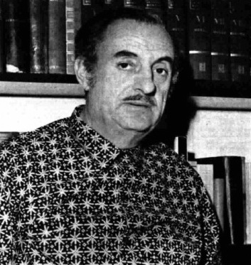 Italian director Edoardo Anton